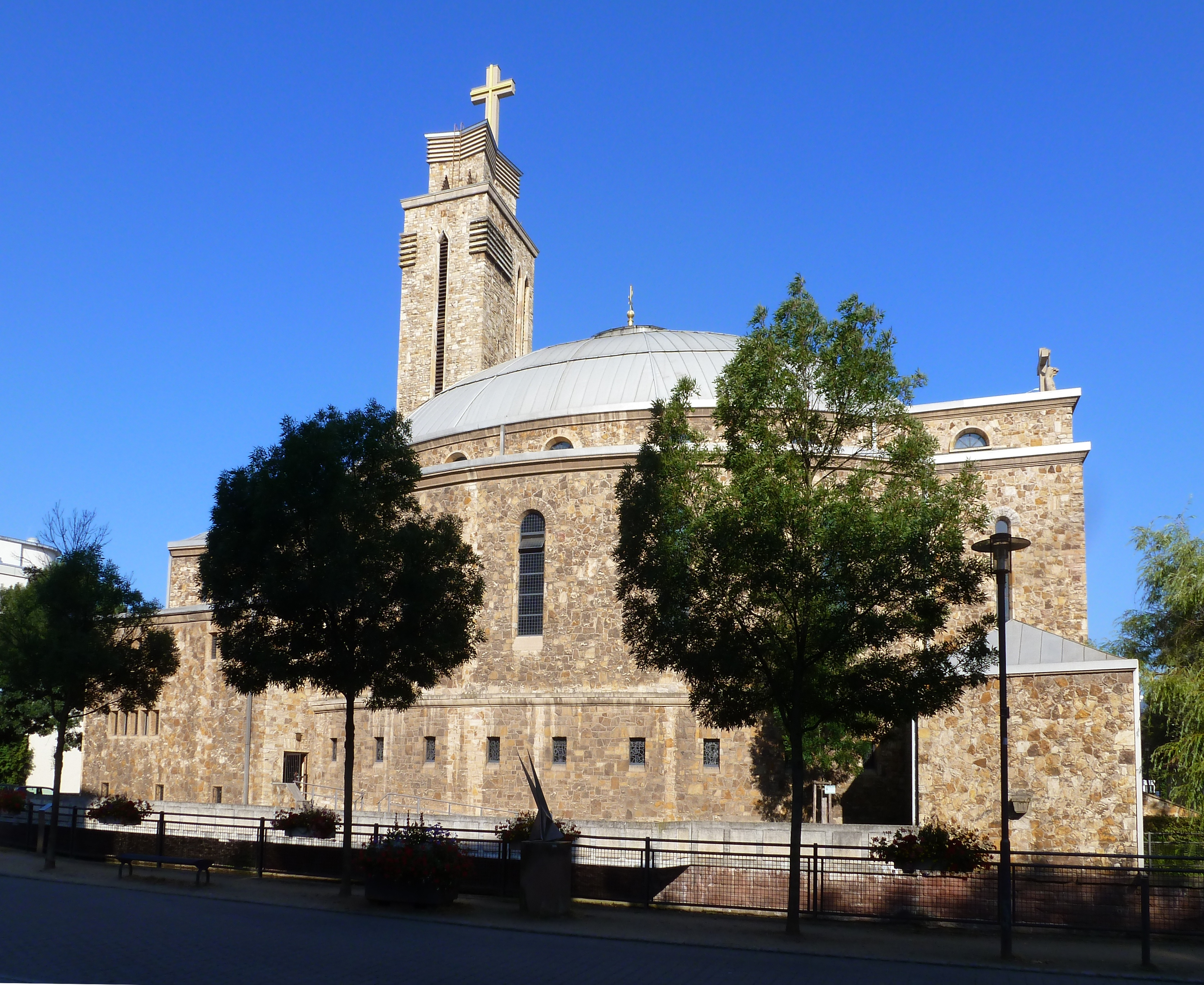 Église du Herz-Jesu à Pforzheim.